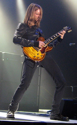 James Valentine in concert